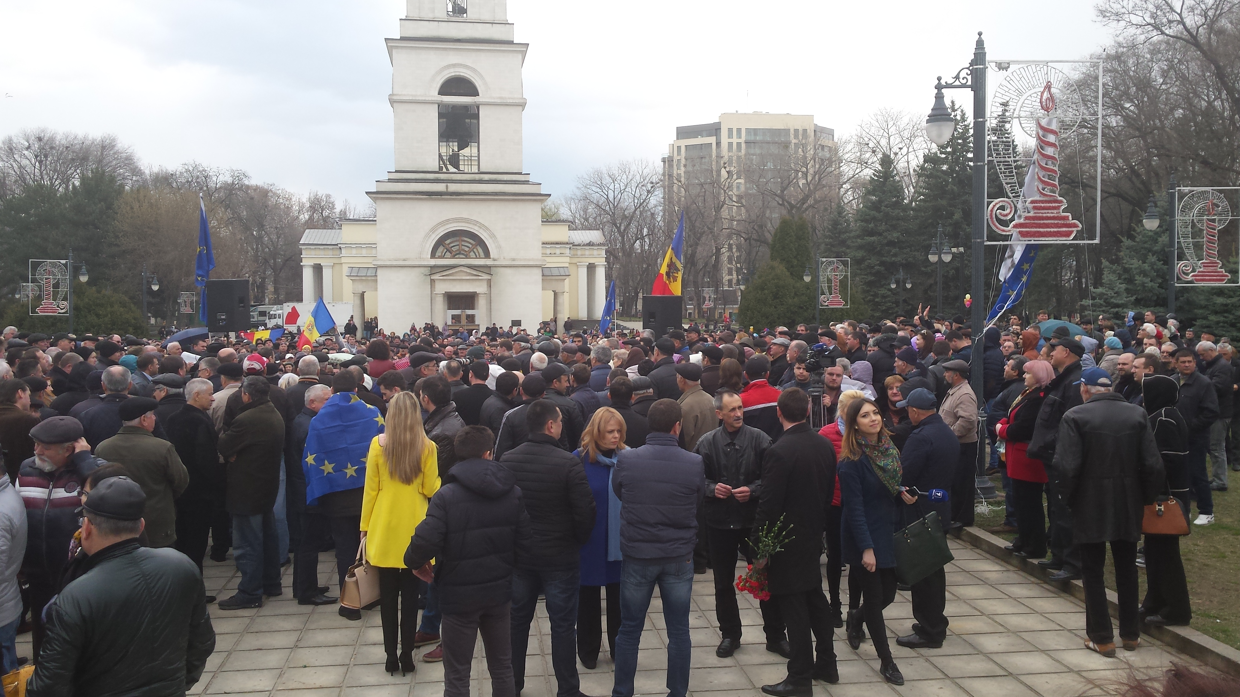 Protestul Platformei Civice Demnitate şi Adevăr (5 aprilie 2015) în Chișinău, R. Moldova